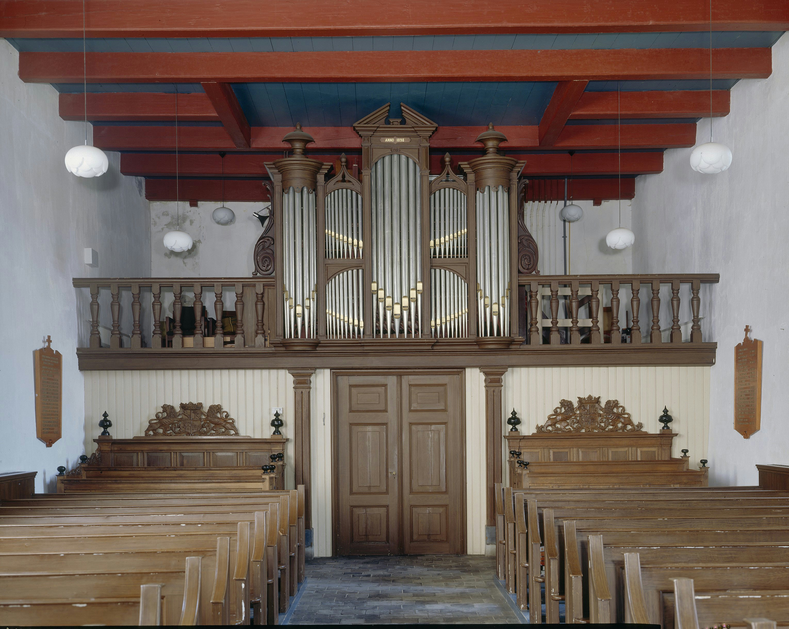 Nederlands Hervormde Kerk: Interieur, overzicht van het orgel